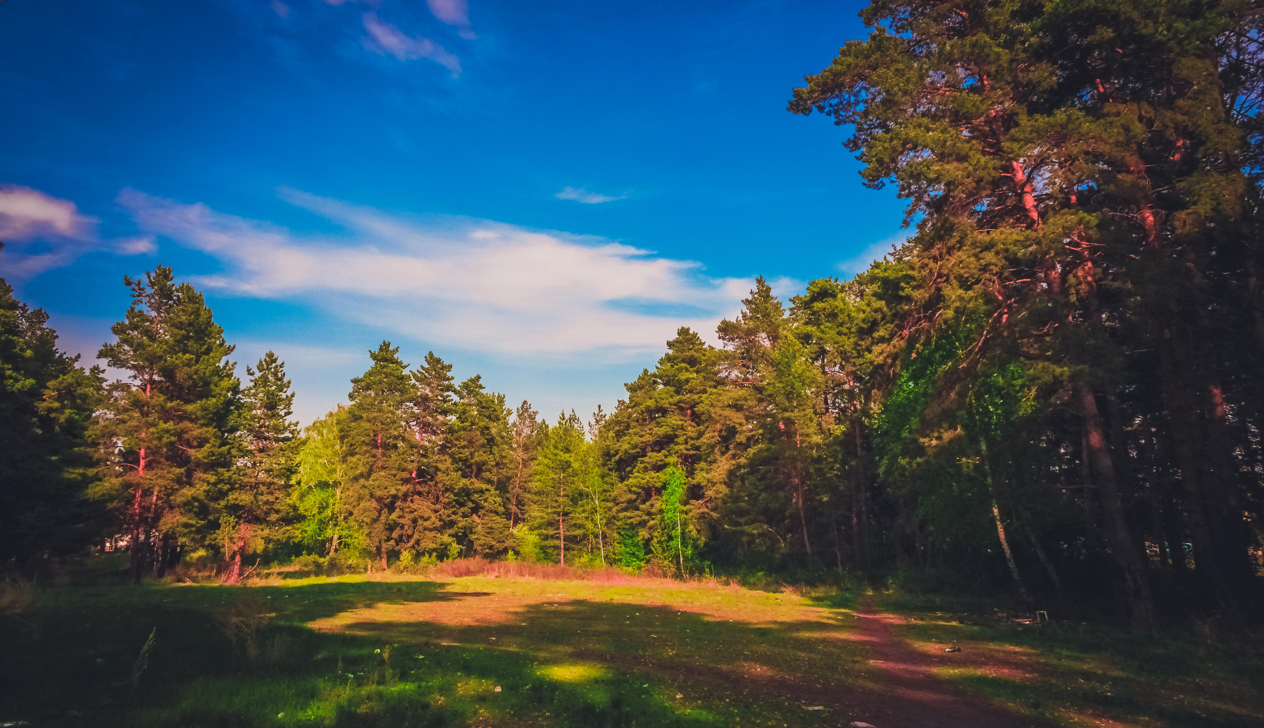 Сосновый бор Золотая сопка: Сосновый бор «Золотая сопка» расположен в степной зоне, подзоне ковыльно-разнотравных (северных) степей, погранично-казахстанского степного района, на левом берегу реки Уй в окрестностях города Троицка Челябинской области,Троицкий район, Челябинская область This image is related to the protected area of Russia number 7410270